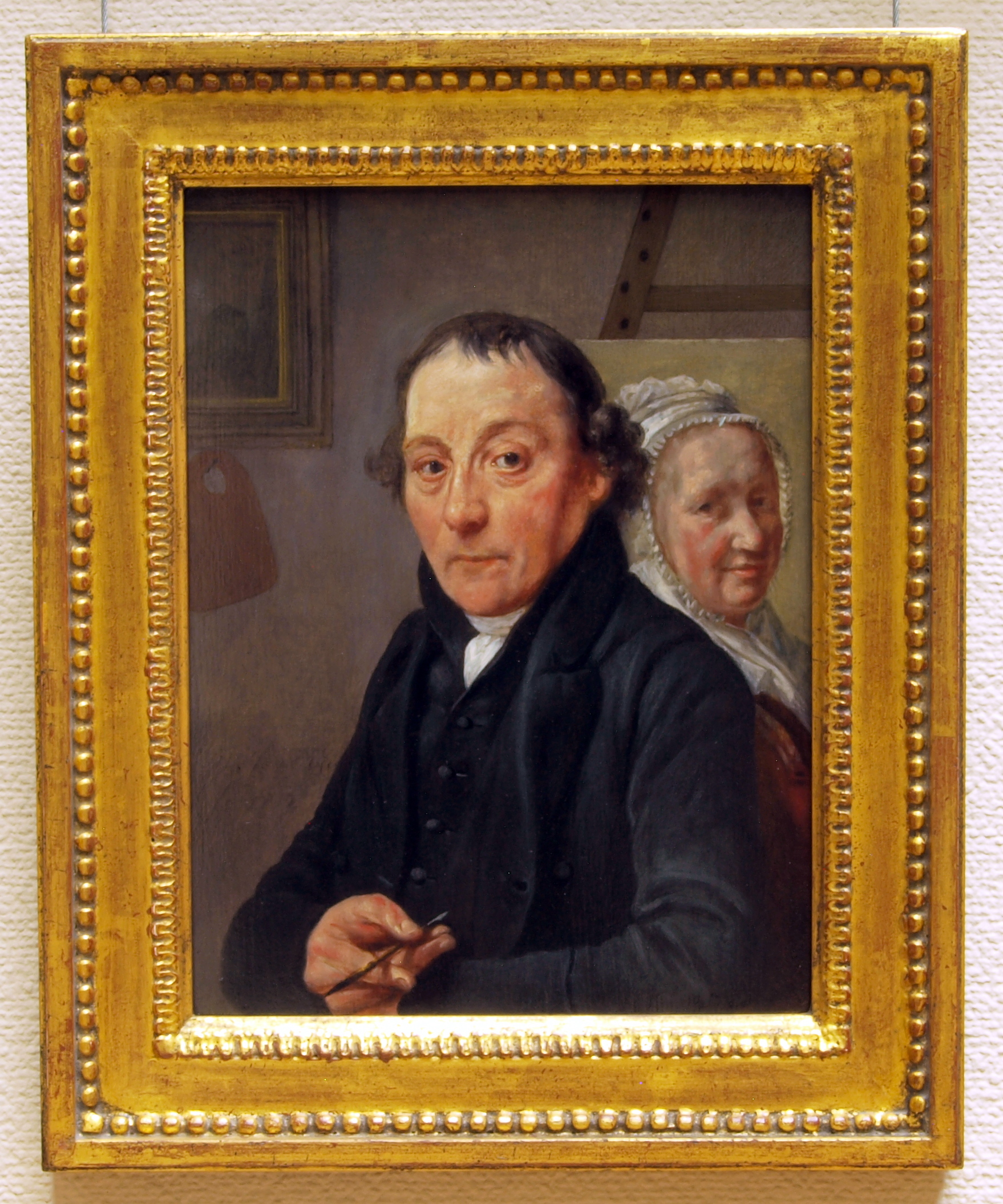 Portret avn de schilder Warnaar Horstink (1756-1815)